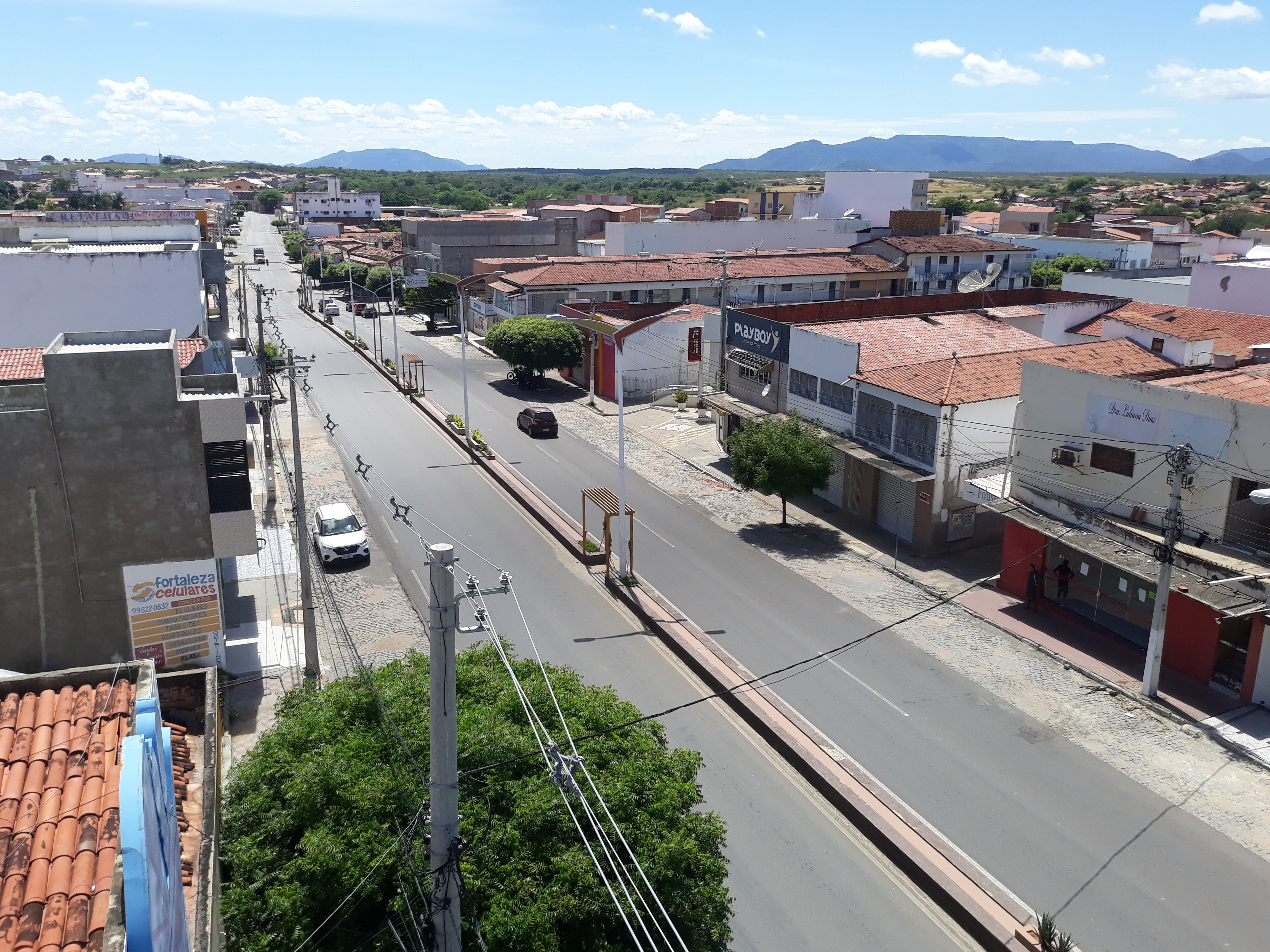 Trecho da BR-405 na Avenida da Independência, importante logradouro da cidade de Pau dos Ferros, no Rio Grande do Norte (Brasil)